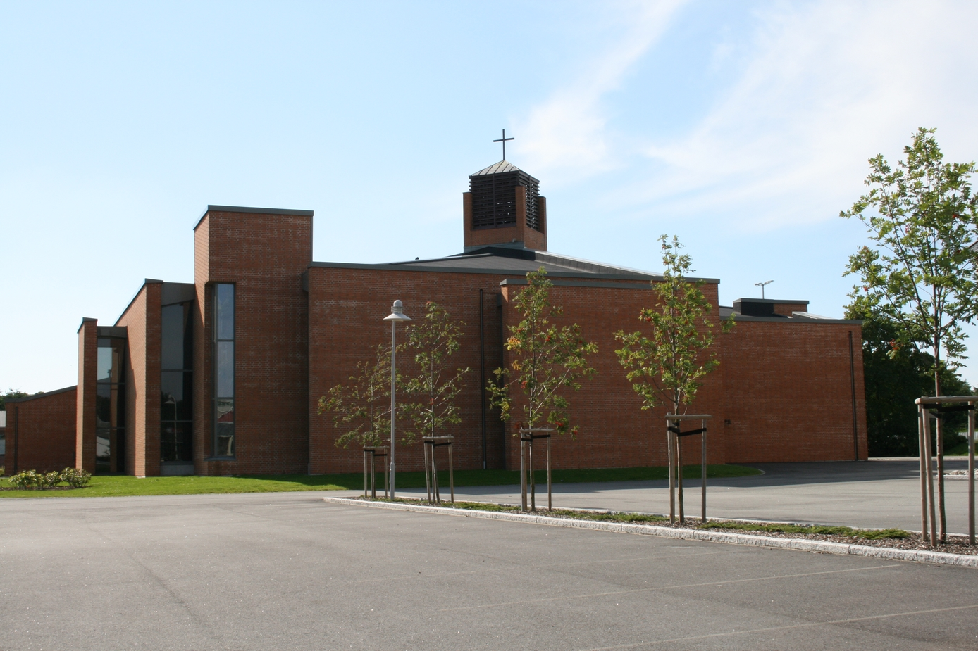 Tananger kirke